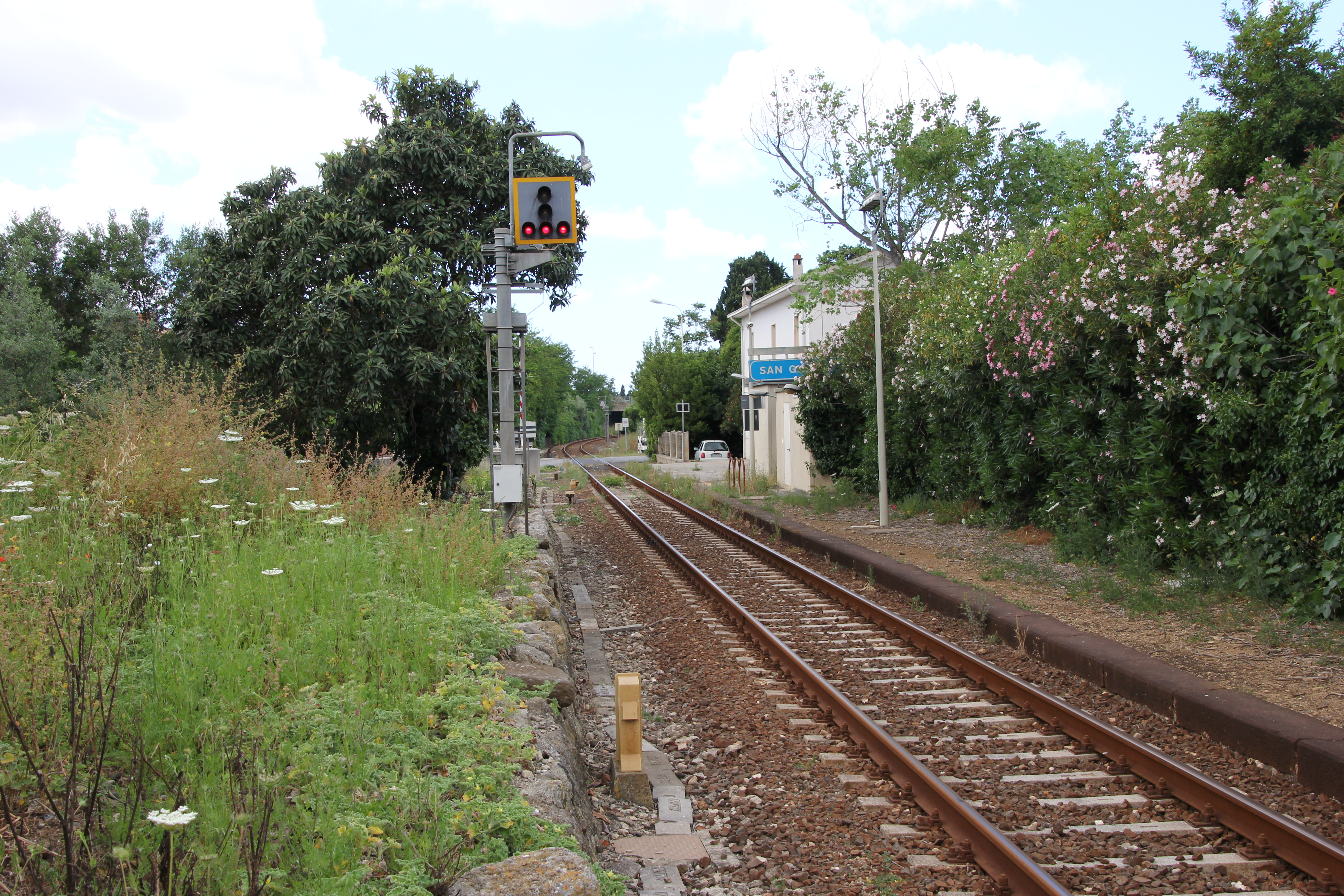 Sassari - Stazione di San Giovanni